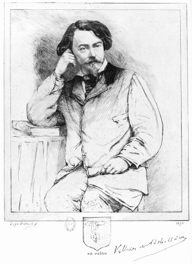 Portrait d'Auguste de Villers de L'Isle-Adam (1838-1889) par Loÿs Delteil (1869-1927). Gravure d'après une photographie de 1886.